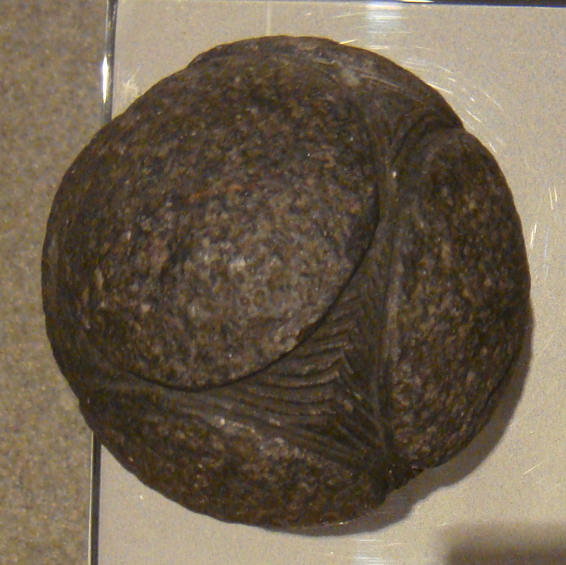 Kelvingrove Art Gallery and Museum de Glasgow. Salas de Prehistoria humana.